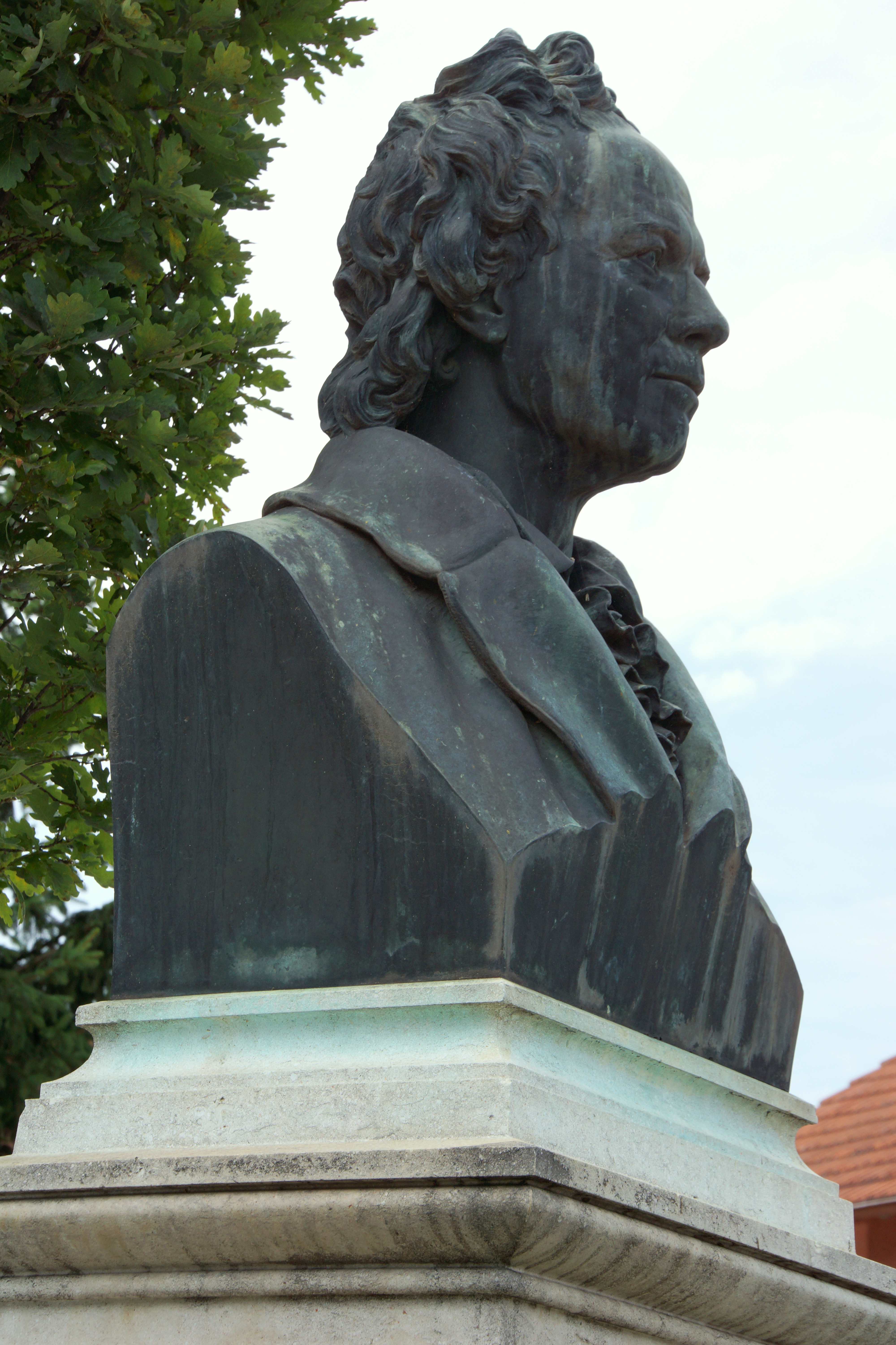 Das Denkmal für den in Weidenwang (oder im Nachbarort Erasbach) geborenen Komponisten Christoph Willibald Gluck stammt von dem Münchner Bildhauer Konrad Knoll aus dem Jahr 1870.